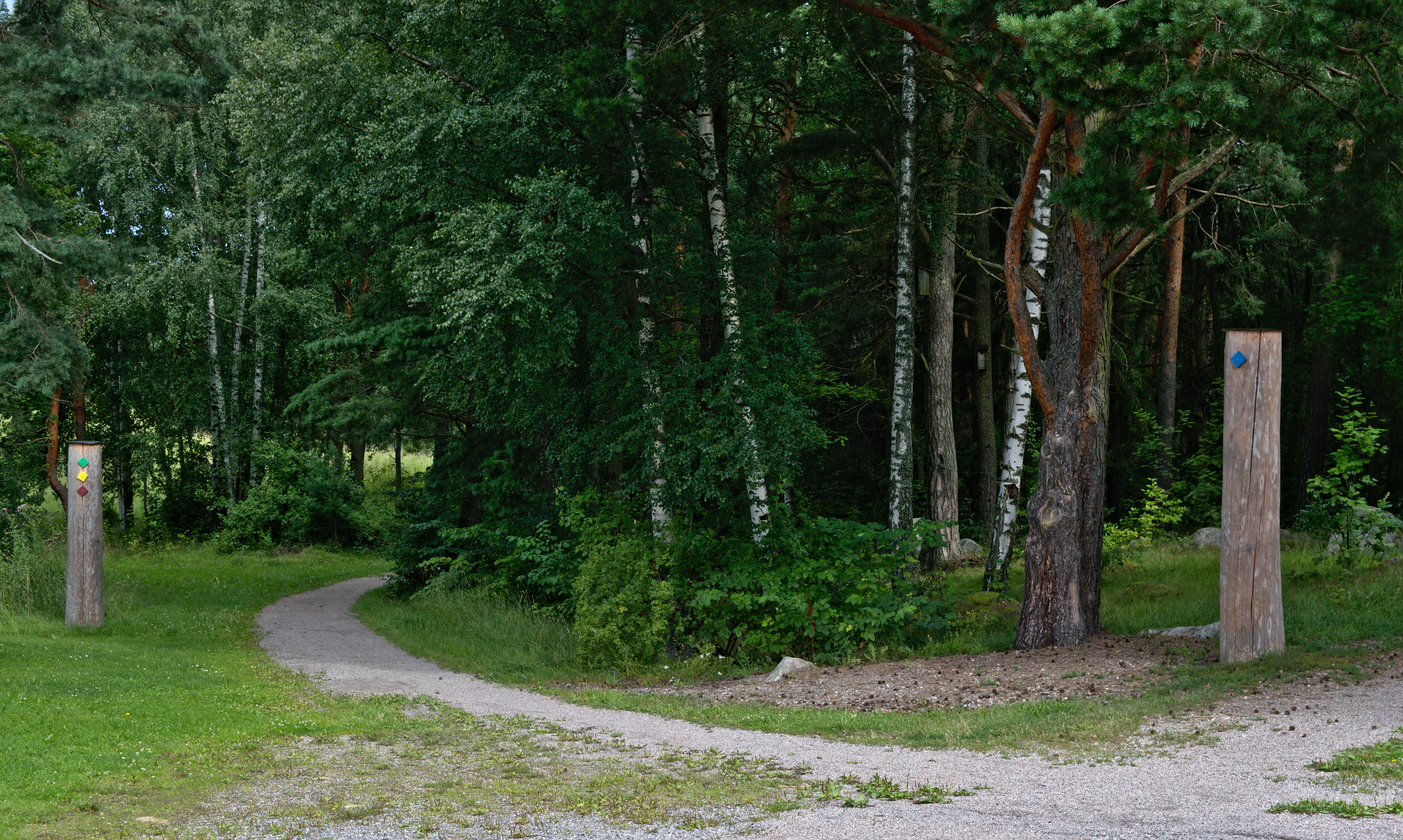 Naturreservatet Årby i Eskilstuna kommun. Start av motionsspåret.